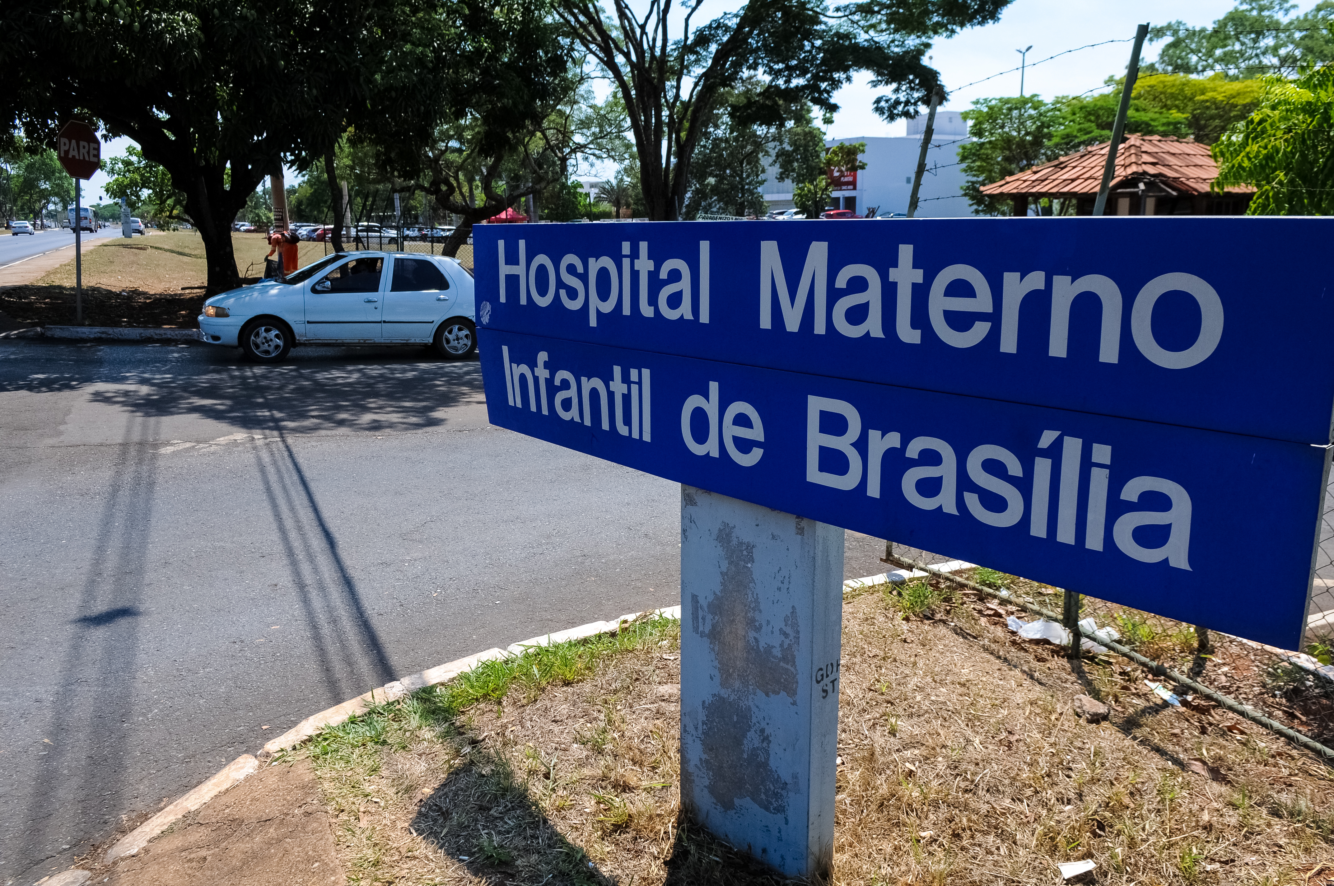 Hospital Materno Infantil de Brasília (HMIB). Foto: Paulo H. Carvalho/Agência Brasília